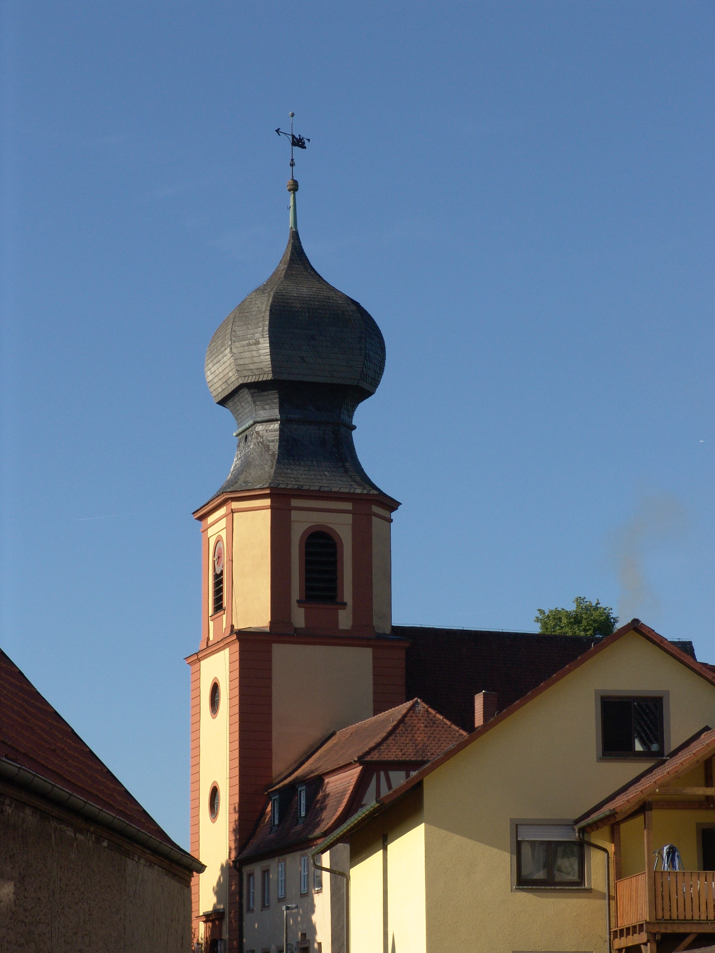 evang.-luth. Kirche St. Nicolai in Neuses am Berg